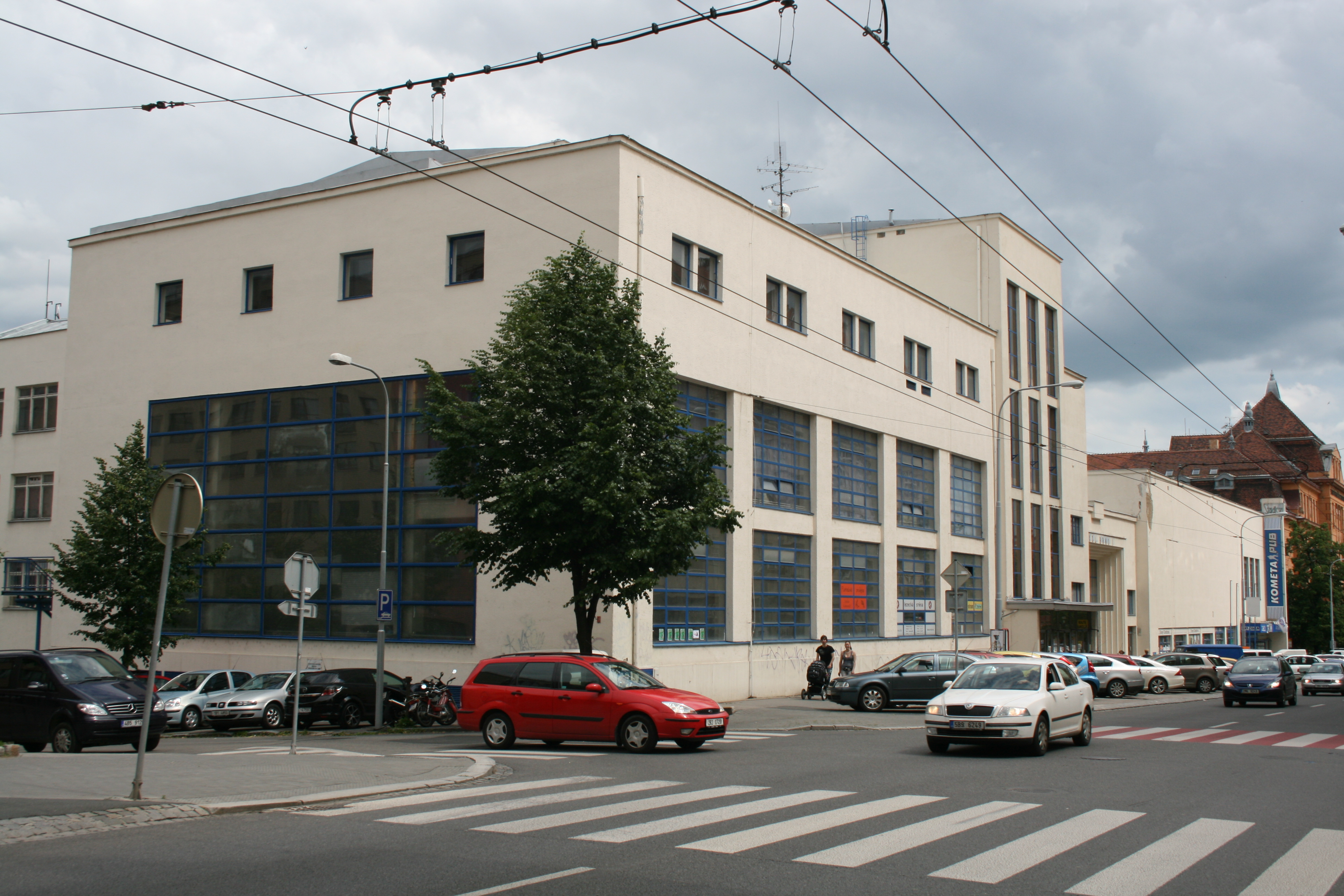 Sokolovna Stadion, Kounicova 18-22, Brno.